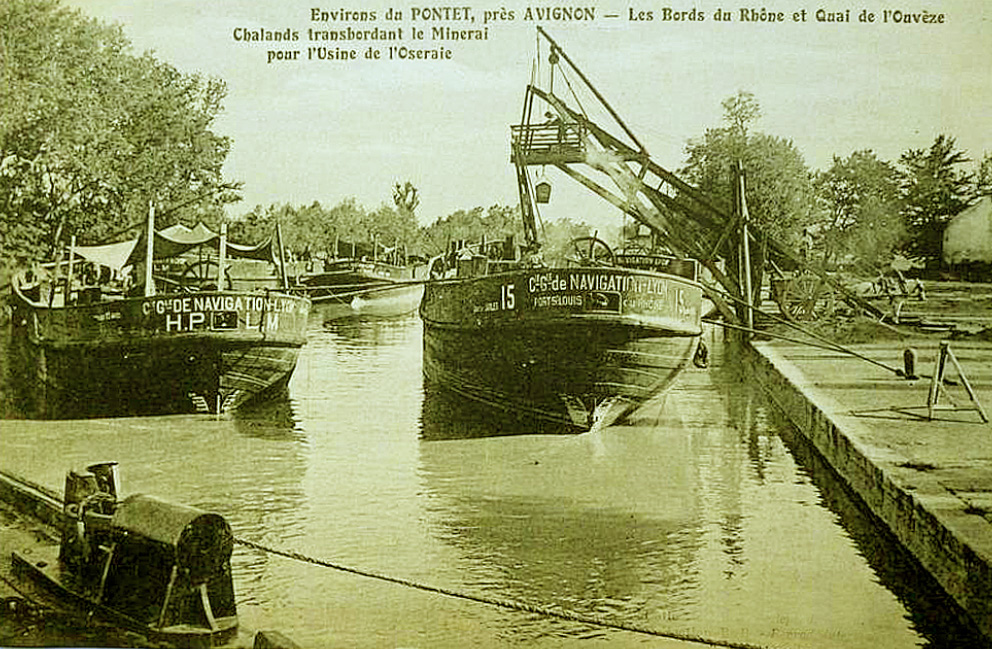 Le Pontet Port sur le canal de l'Ouvèze